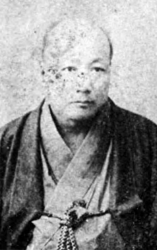 井上頼圀（1839-1914）